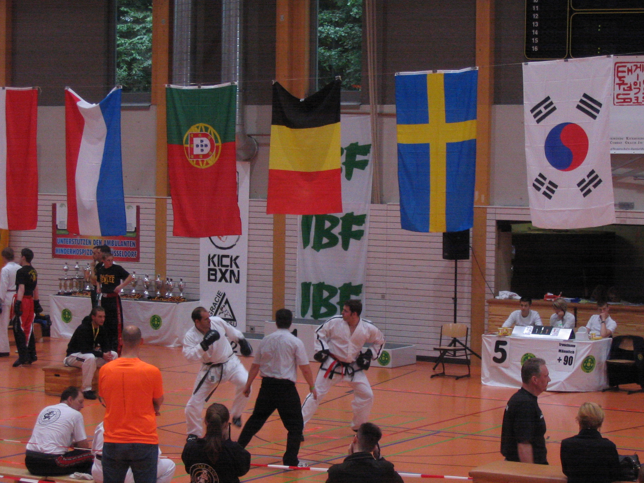 Deutsche All Style Karate-Meisterschaft German Open 2012, Düsseldorf Sporthalle Brinckmannstraße 16